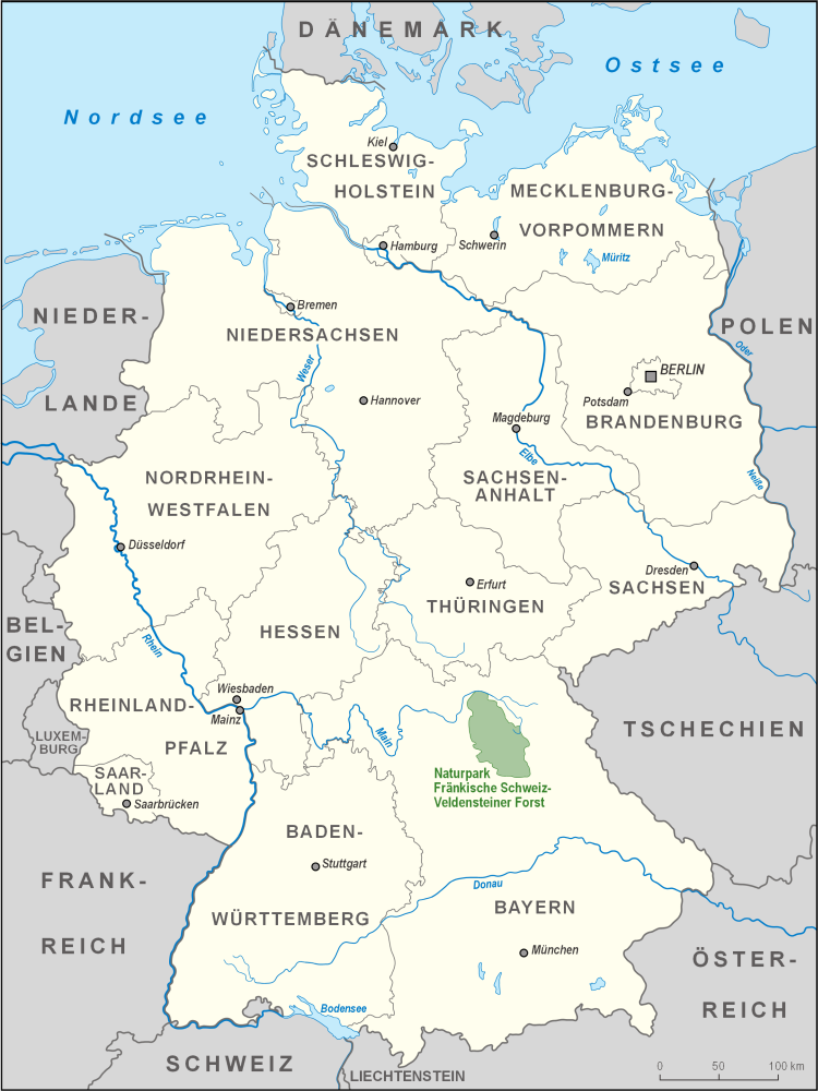 Karte des Naturparks Fränkische Schweiz-Veldensteiner Forst in Deutschland